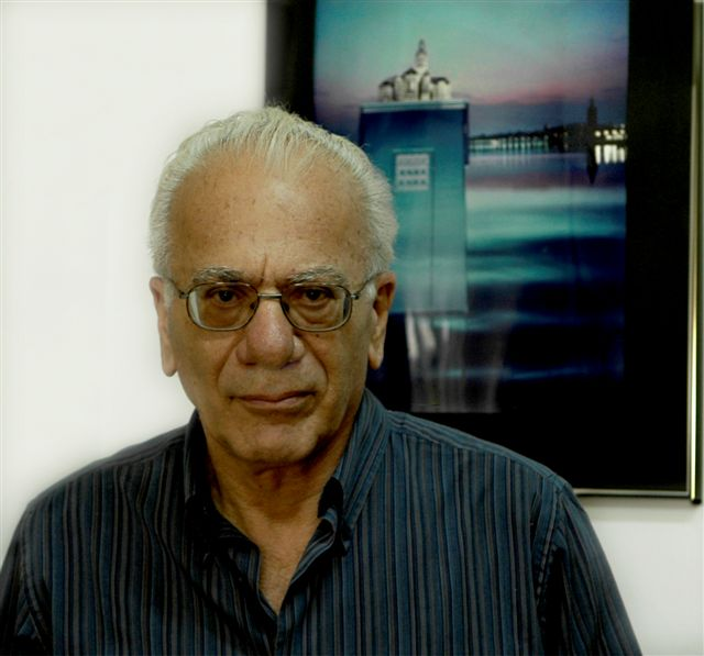 Professor Gedeon Dagan